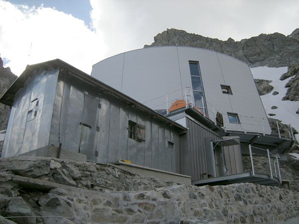 Refuge Gonella, massif du Mont-Blanc, val d'Aoste, Italie